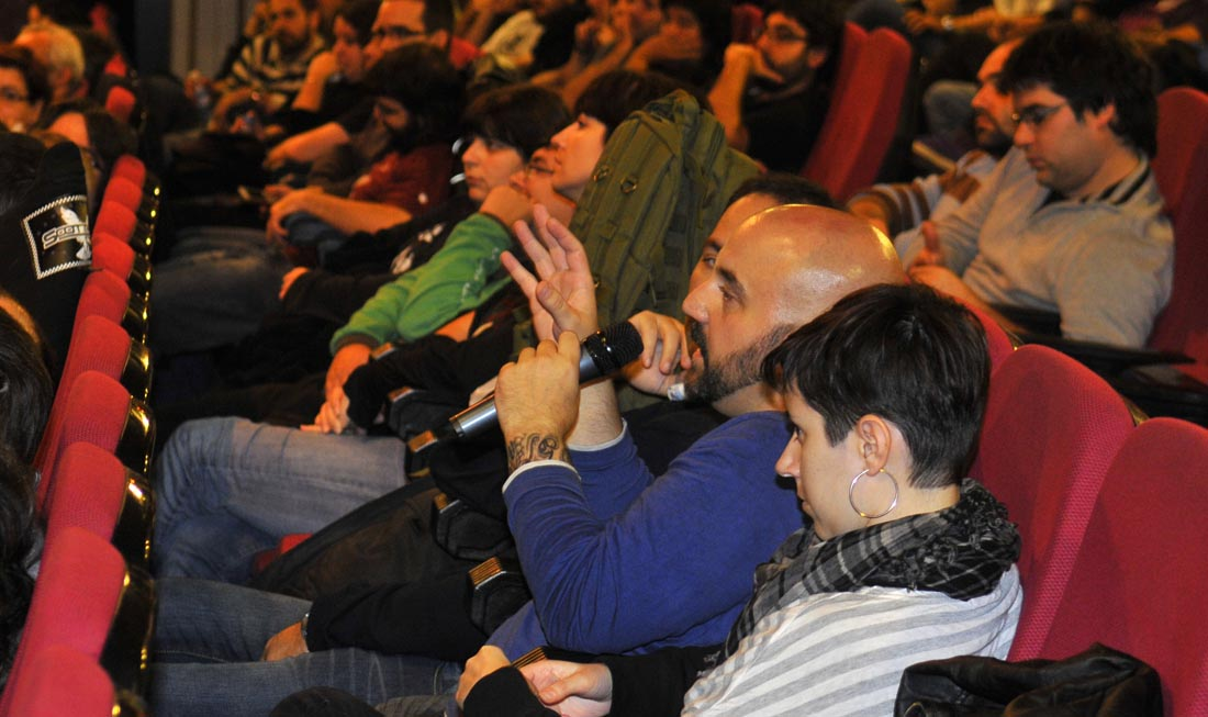 Argazkia-fotografía: Iñigo Royo.